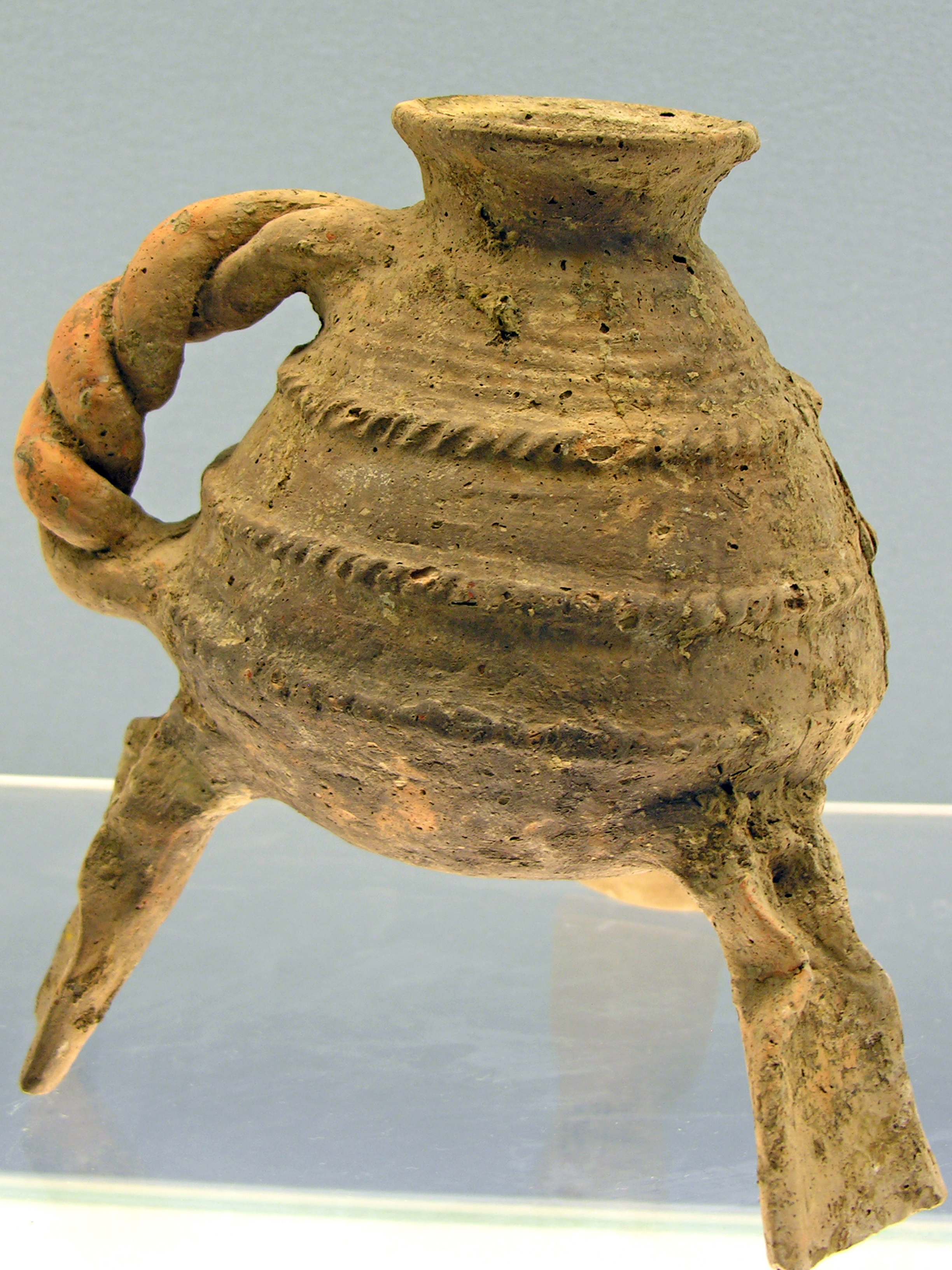 Poterie vinaire de la culture Songze